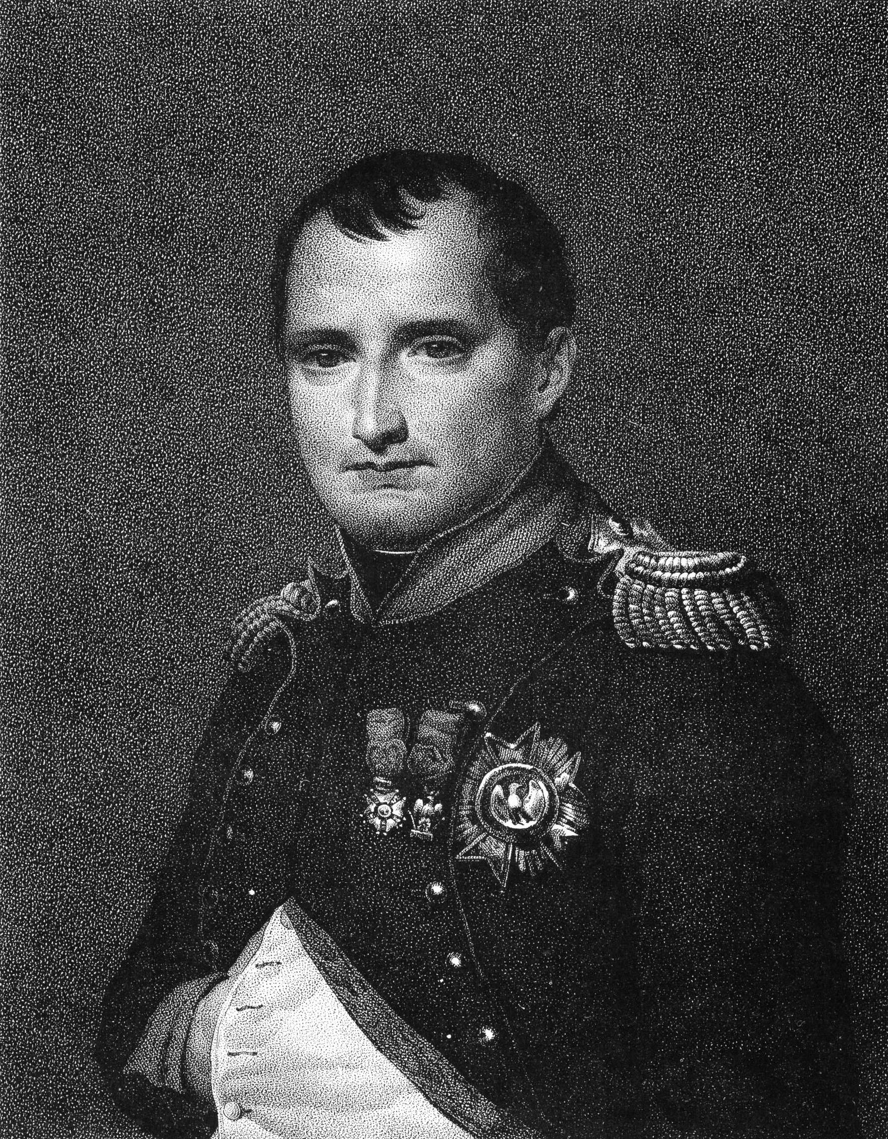 Napleon Bonaparte, Gemälde von David, 1812, Lithografie von Louis Kramp ca.1825